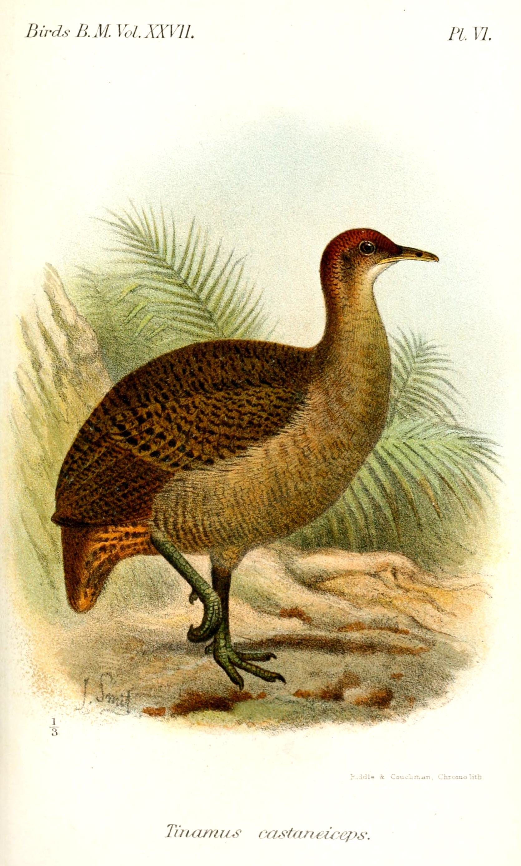 Tinamus castaneiceps = Tinamus major castaneiceps, Great Tinamou ssp.